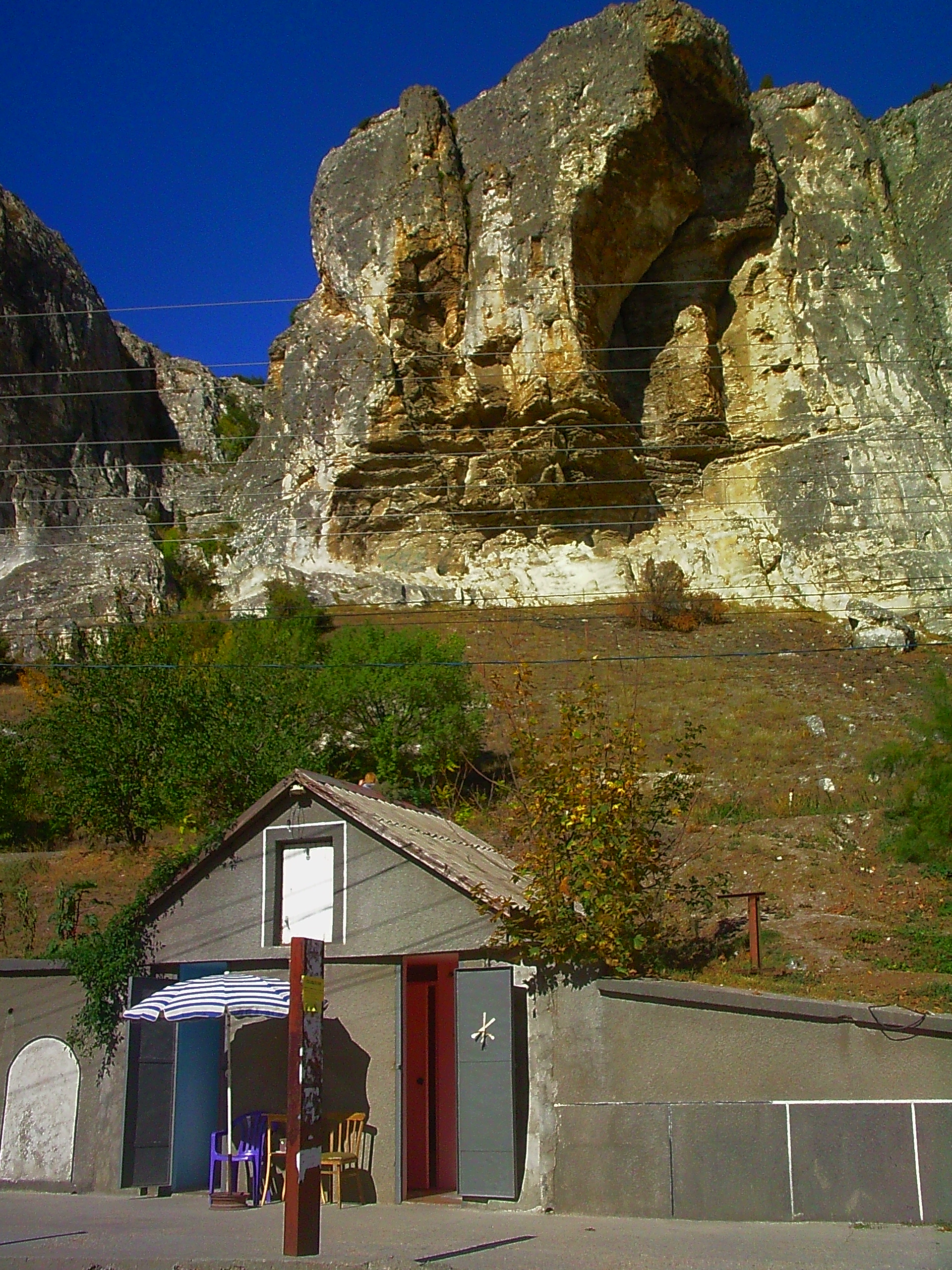 Здание Райсобеса